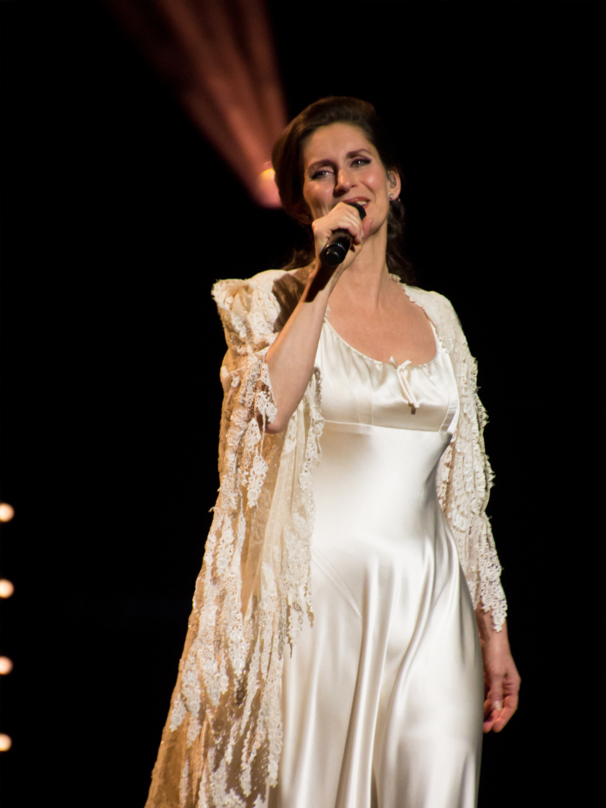 Pia Douwes tijdens Musicals in Concert